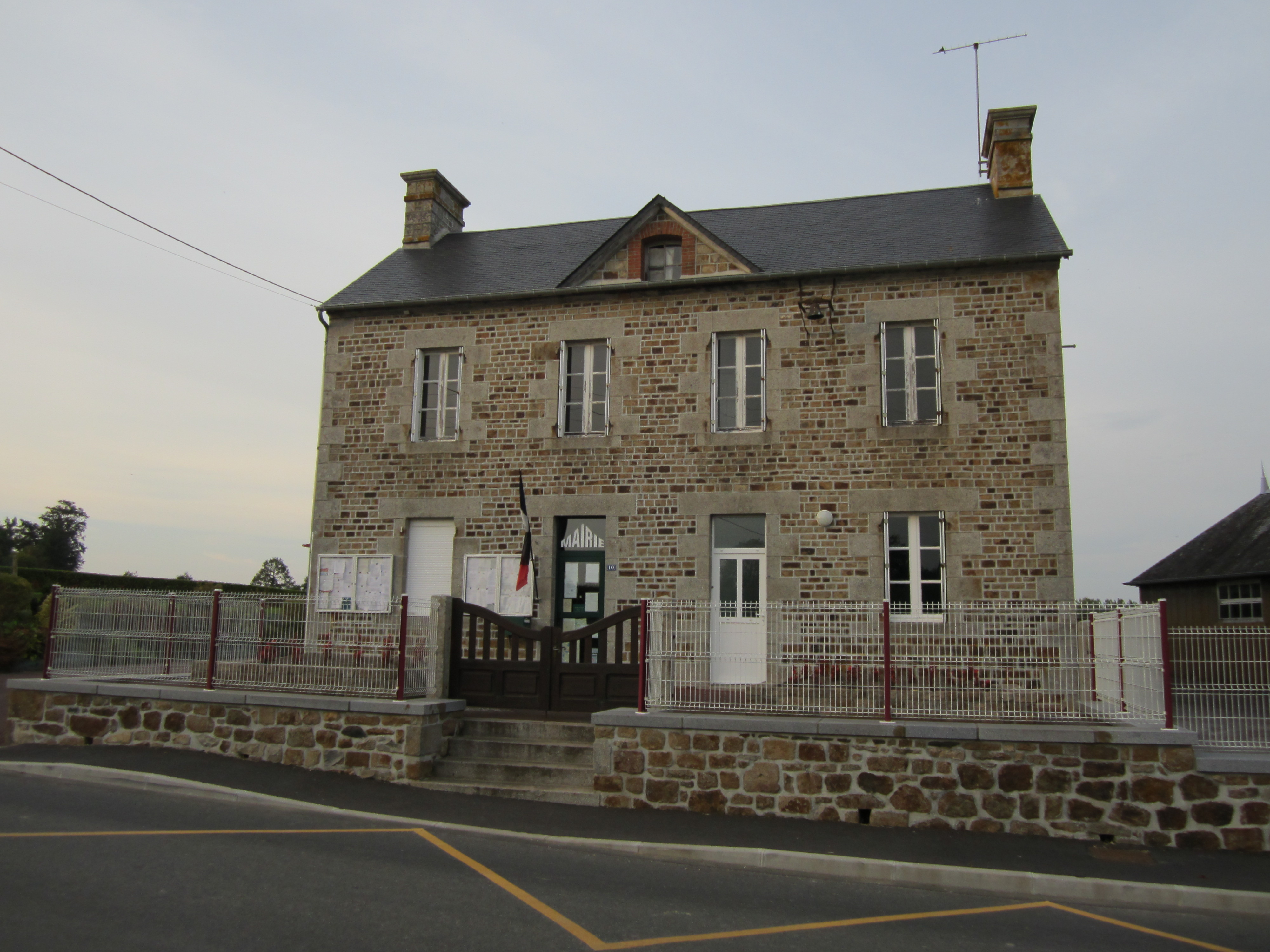 Husson, Manche